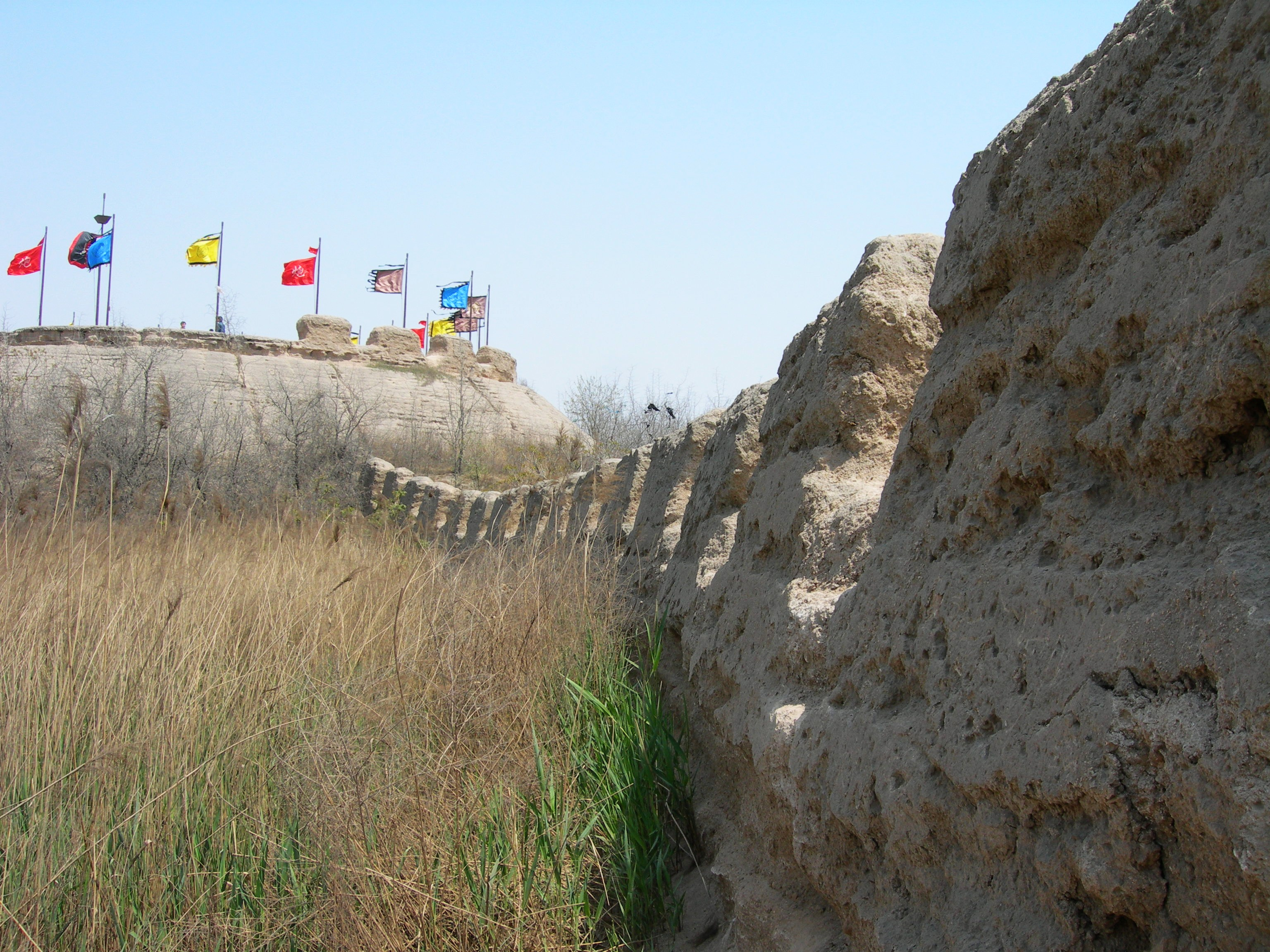 大沽口炮台3